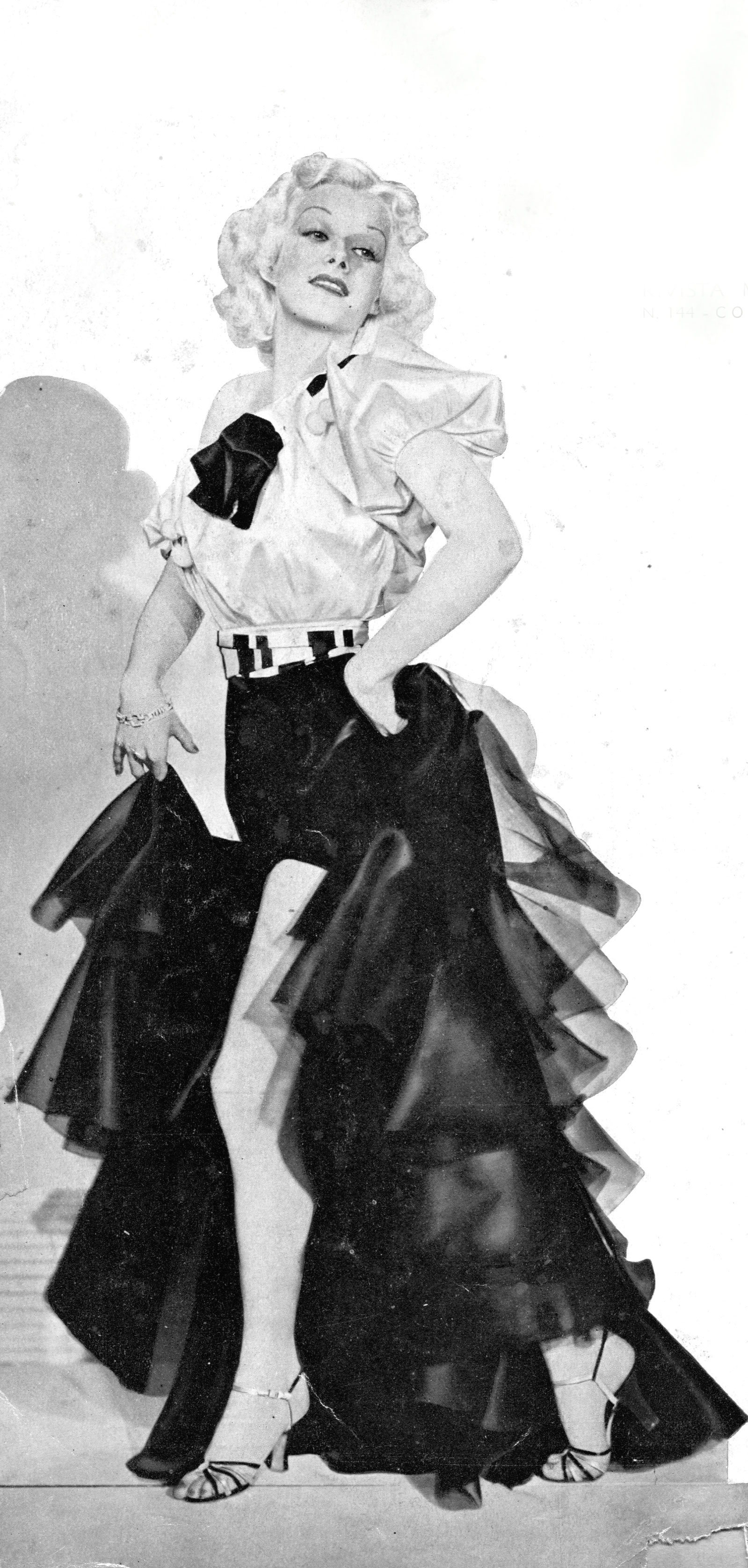 Jean Harlow in Tentazione bionda (Reckless) - Fleming, 1935